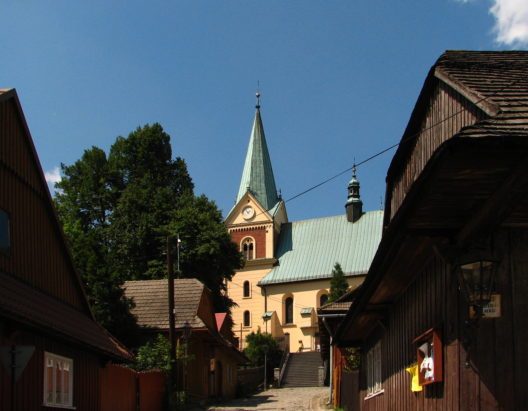 kościół Narodzin Jana Chrzciciela w Lanckoronie, widok z południa, z ulicy św. Jana